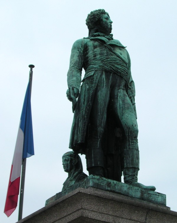 La statue du Général Kléber à Strasbourg, France. Erigée en 1840, elle avait été enlevée par les Allemands en 1940, mais retourna sur son socle en 1945.